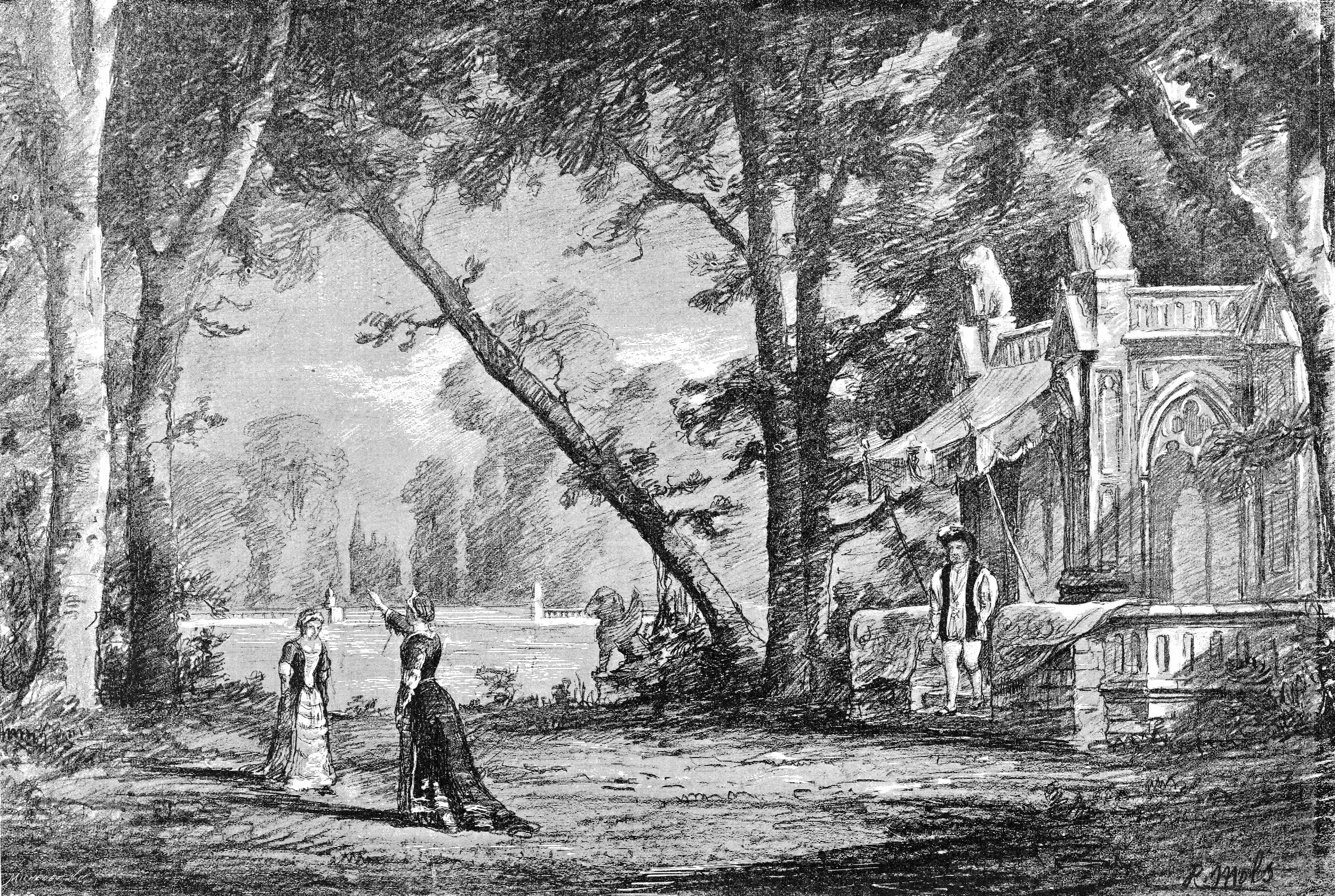 Saint-Saëns - Henry VIII - Le parc de Richmond, 2e acte, 2e tableau - Lavastre, Michelet, Mols 1883